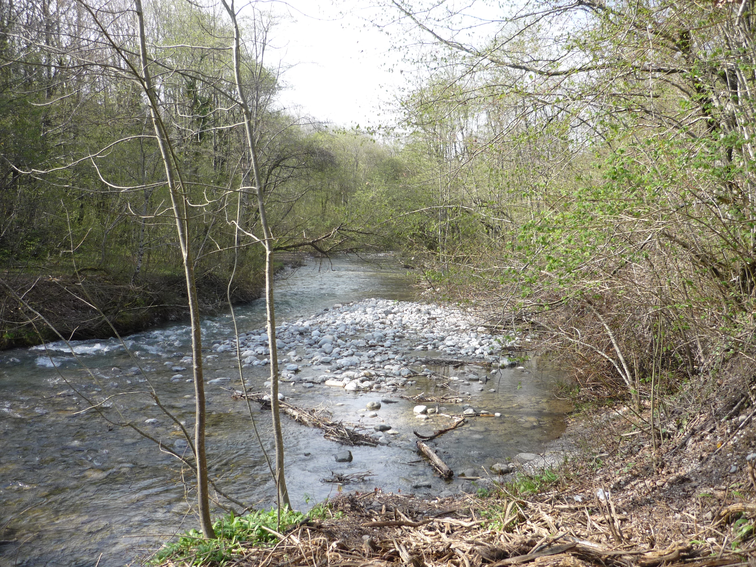 L'Ire dans la réserve naturelle du Bout-du-Lac, Doussard, Haute-Savoie, France